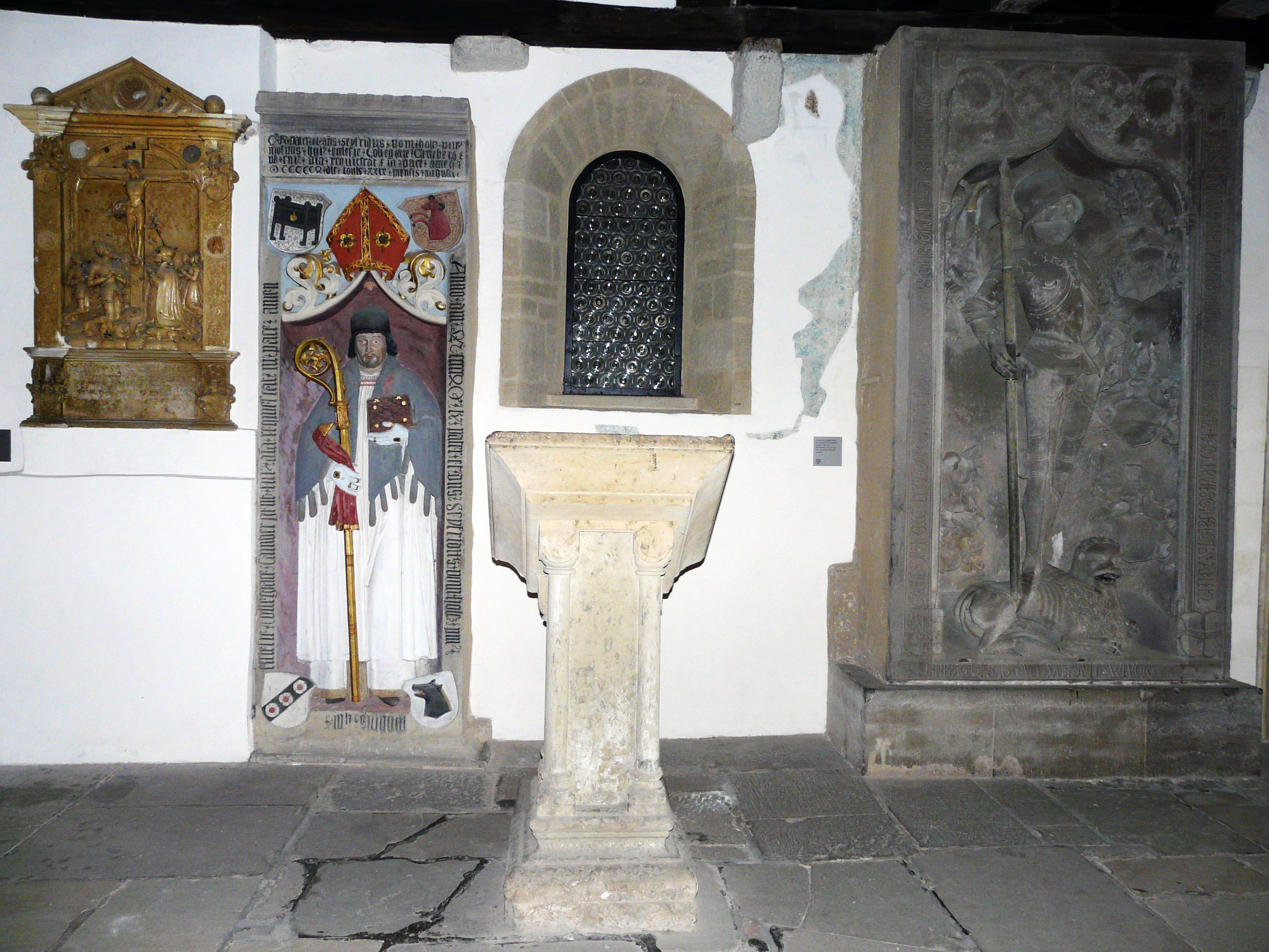 Шенкенкапелла. Кафедра.